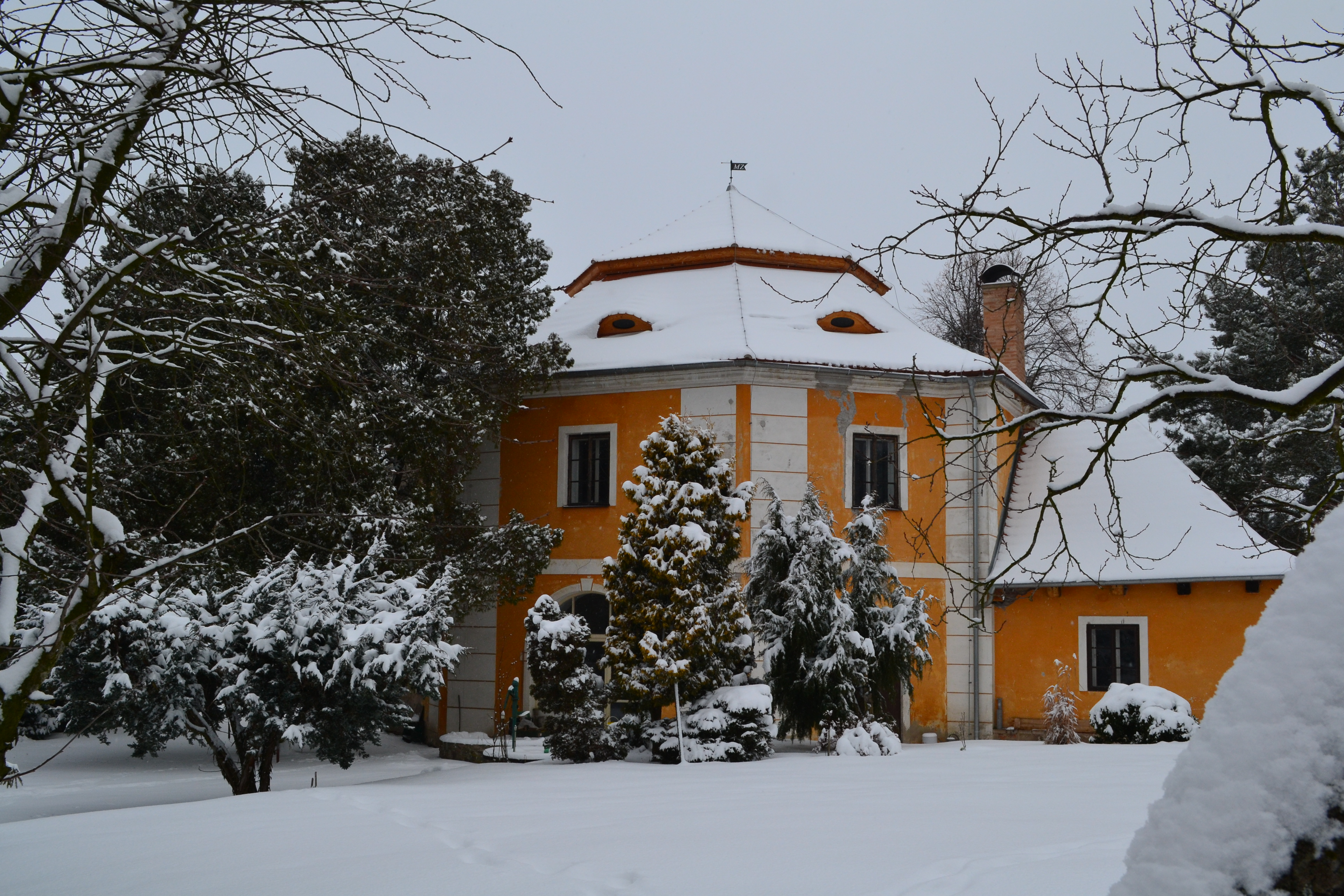 Horušice v zimě 2013, pohled ze zahrady